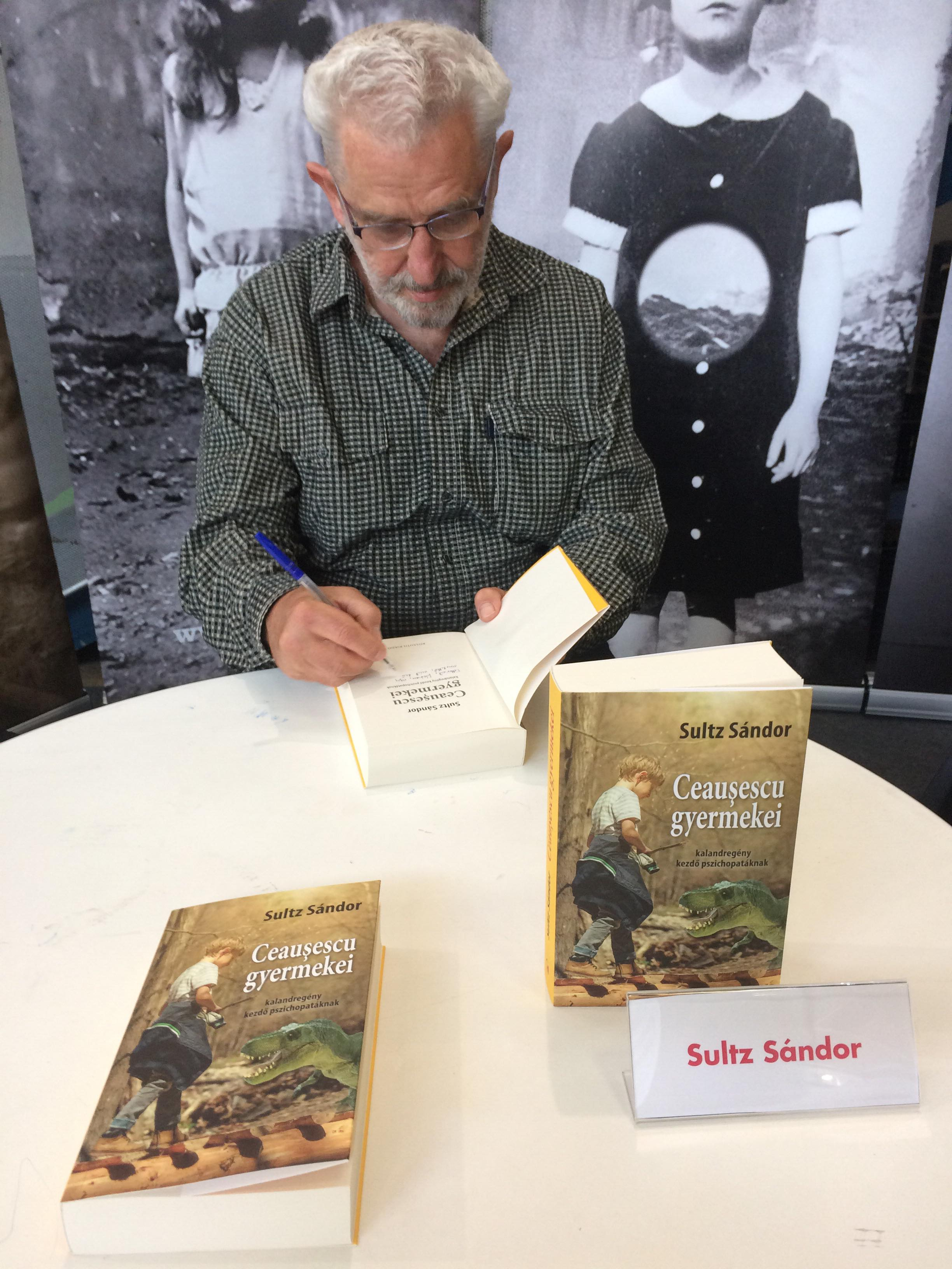 Sultz Sándor író, drámaíró új könyvét dedikálja a XXVI. Budapesti Nemzetközi Könyvfesztiválon.